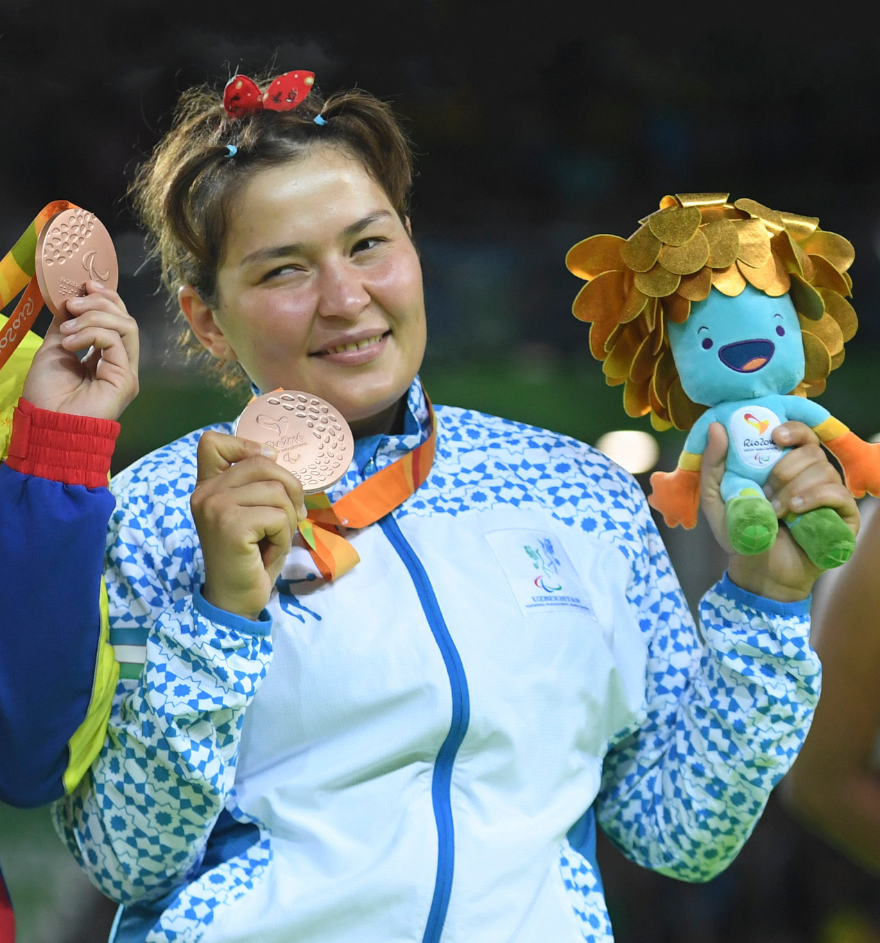 Rio de Janeiro - A azerbaidjaneixa Gulruh Rahimova recebe medalha de bronza no judô categoria até 70 kg na Paralimpíada Rio 2016.